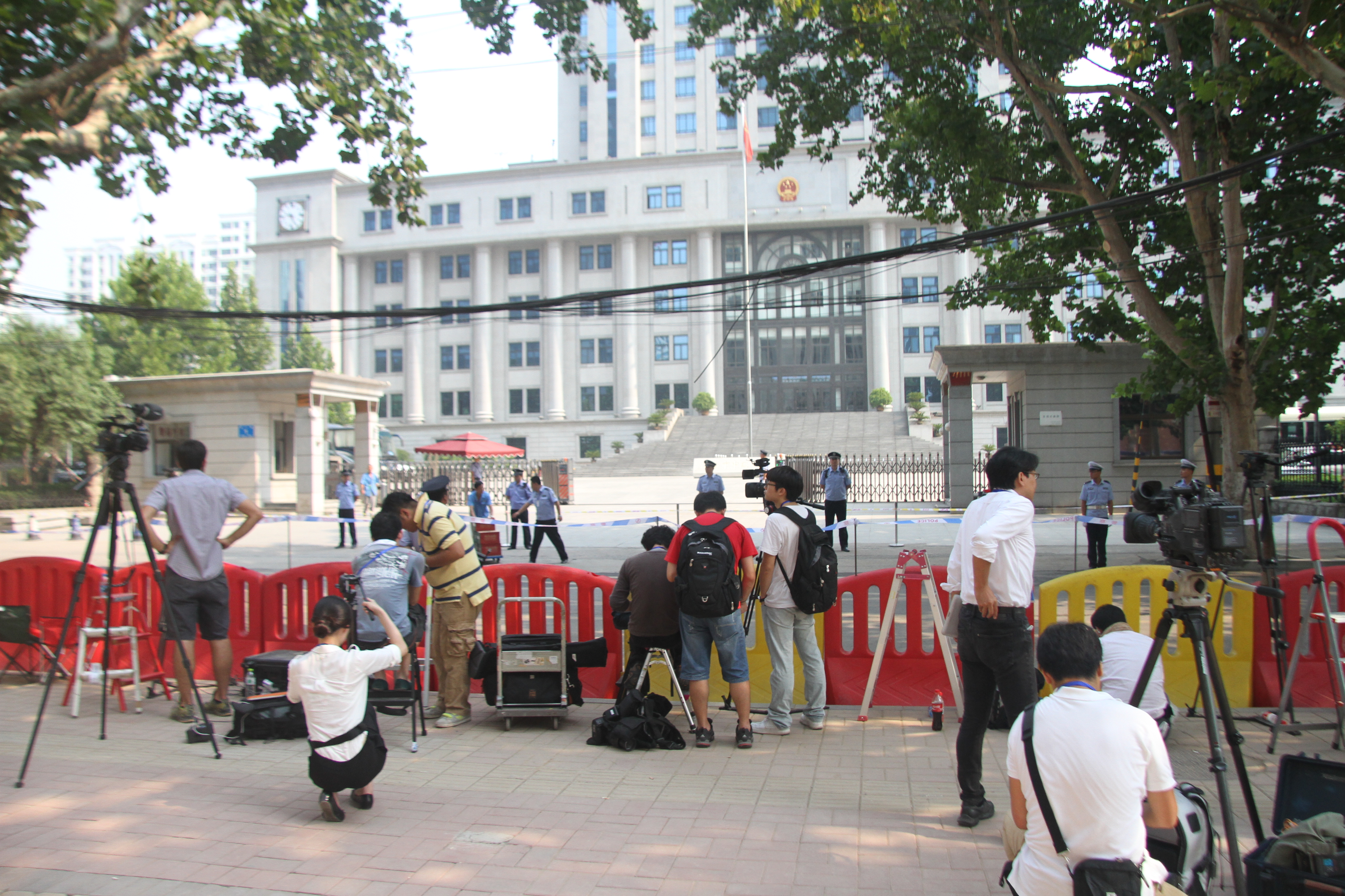 警戒线外面的记者